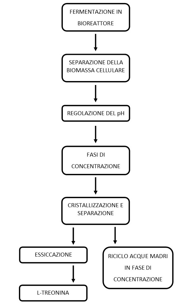 Schema di produzione tramite processi fermentativi della L-treonina